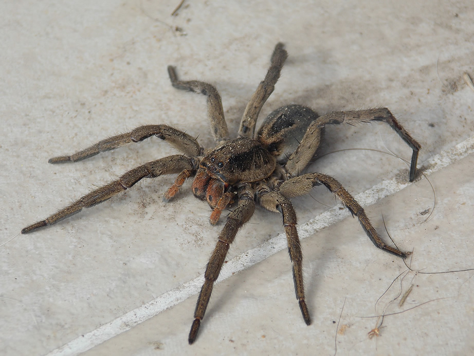 Hembra adulta de Lycosa erythrognatha, fotografiada el 23/07/2016 en Dique Luján, Buenos Aires, Argentina.